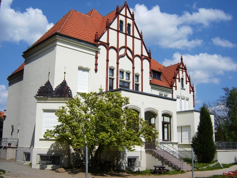 Ehemaliges Gutshaus in Rogätz (Sachsen-Anhalt)